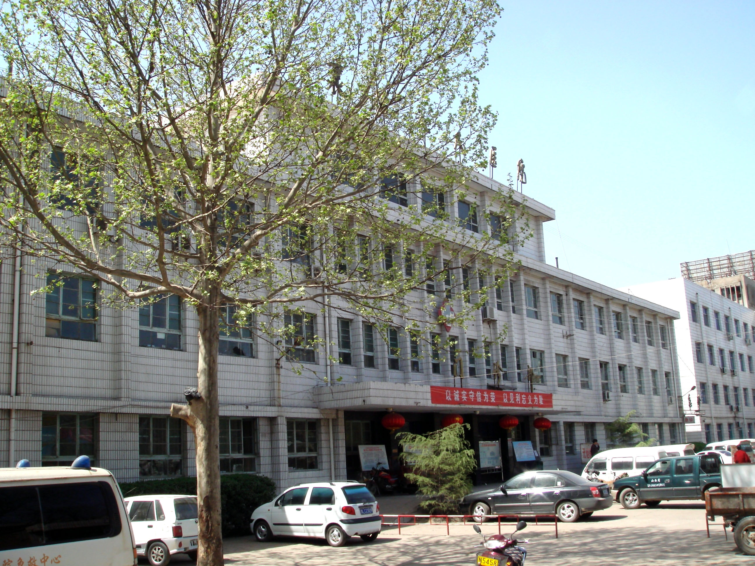 襄汾县人民医院门诊楼